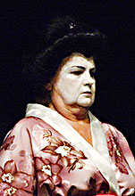 Stanisław Celińska jako "Japonka po przejściach" w "Udając ofiarę" Braci Presniakow, reżyseria: Maciej Englert